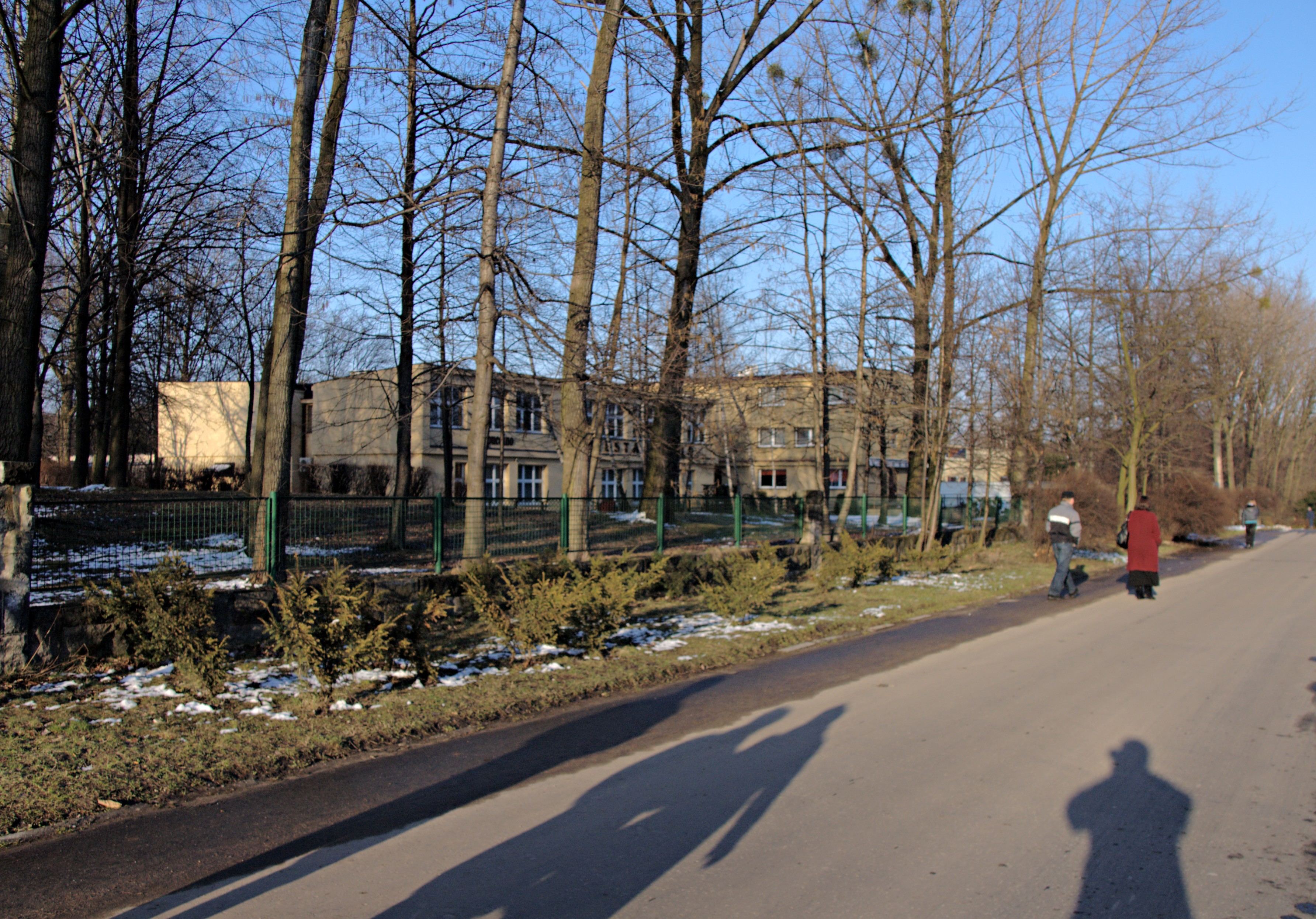 Chorzów, ulica Harcerska. Hotel Skaut.